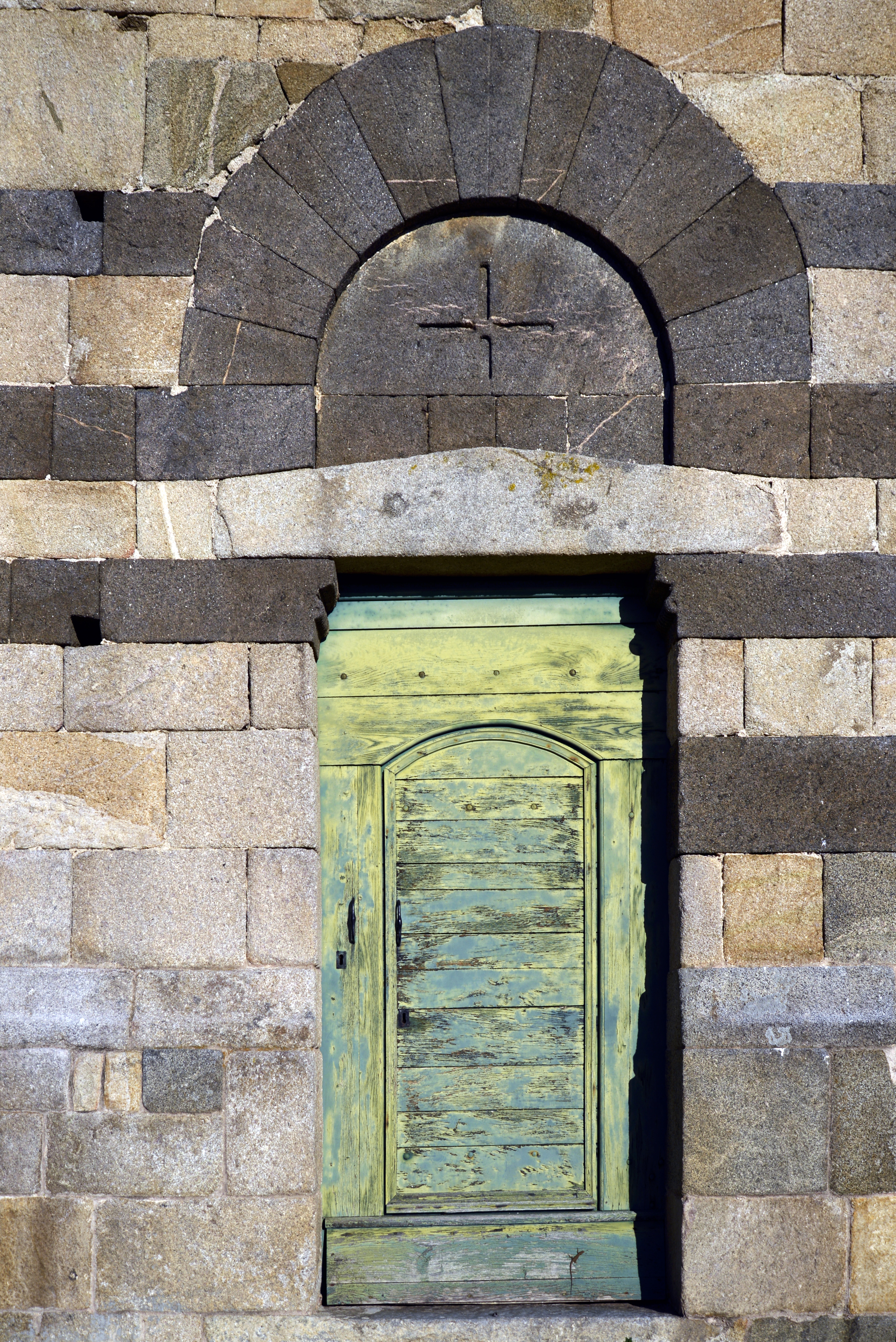 Montegrosso, Balagne (Haute-Corse) - Portail de l'église romane San Raineru de Lunghignano